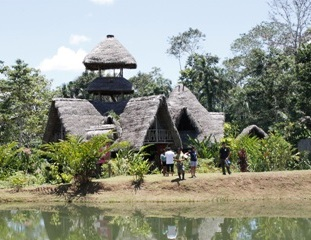 Sinchi Warmi